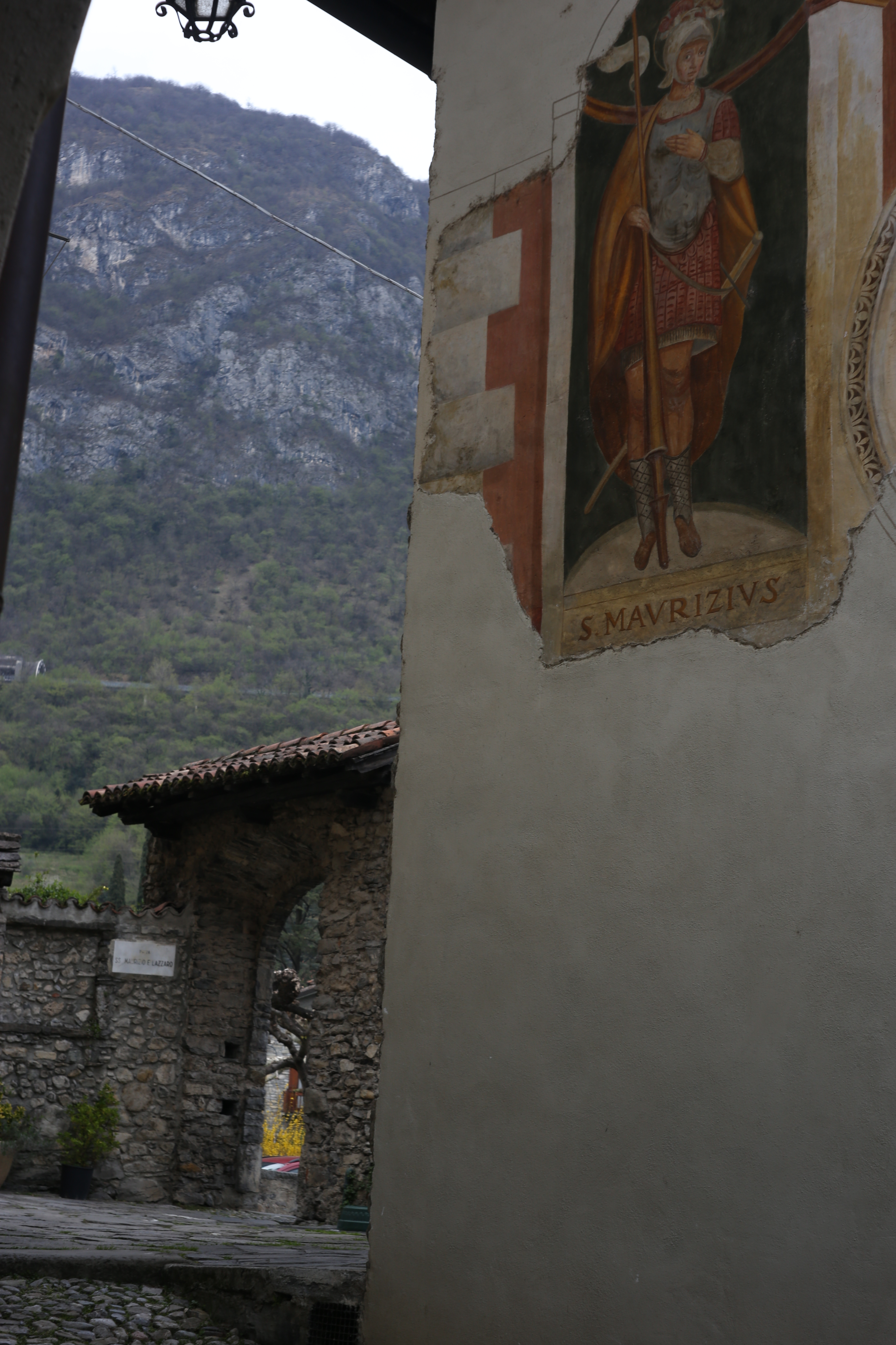 Lierna